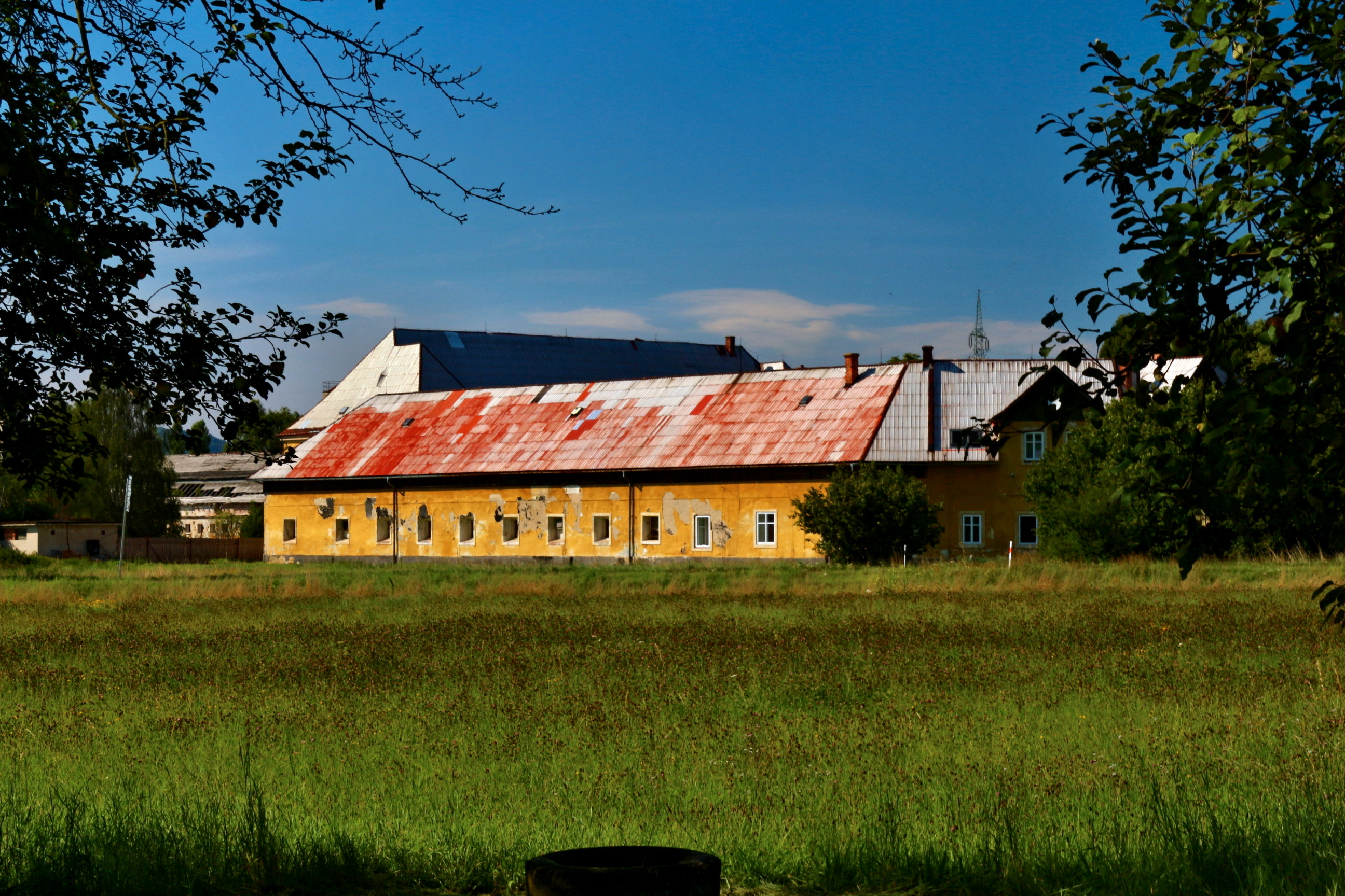 Noviny p. Ralskem